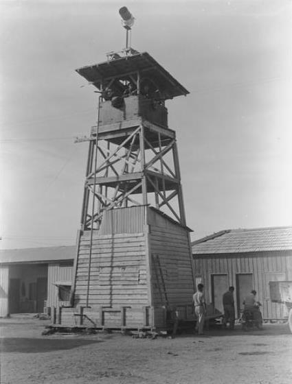 מעוז חיים מגדל שמירה 1938 צלם זולטן קלוגר גנזך המדינה